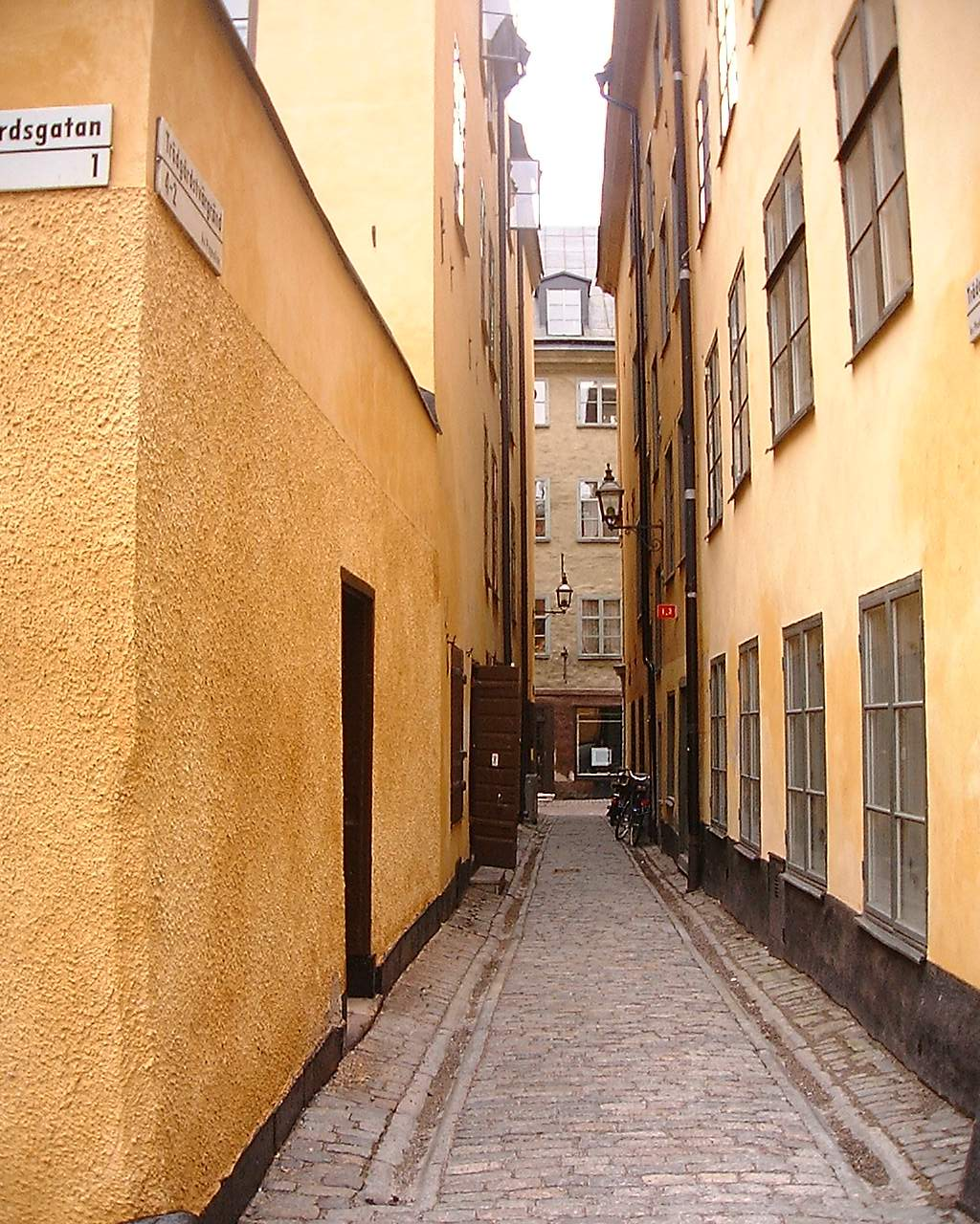 Trädgårdstvärgränd, Gamla stan, Stockholm.